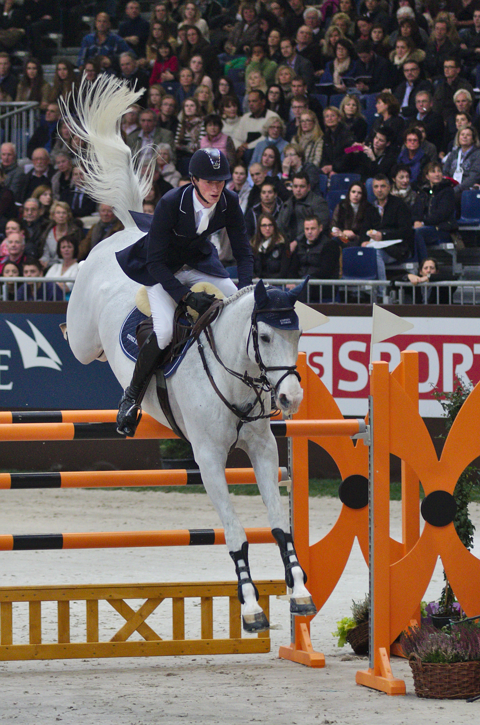 54eme CHI de Genève - 20141212 - Daniel Deusser et Cornet d'Amour